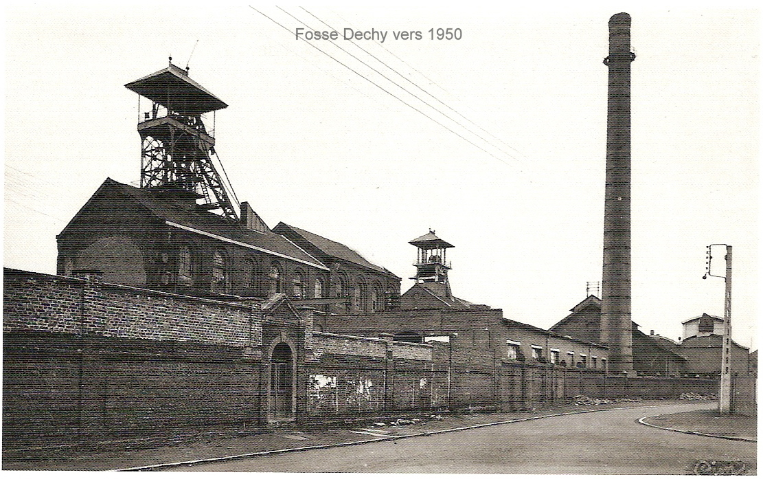 Fosse de Dechy de l'ancienne Cie d'Aniche aujourd'hui disparue